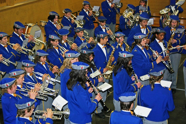 Schweizerische Kadettentage 2008 Winterthur Kadettenmusik